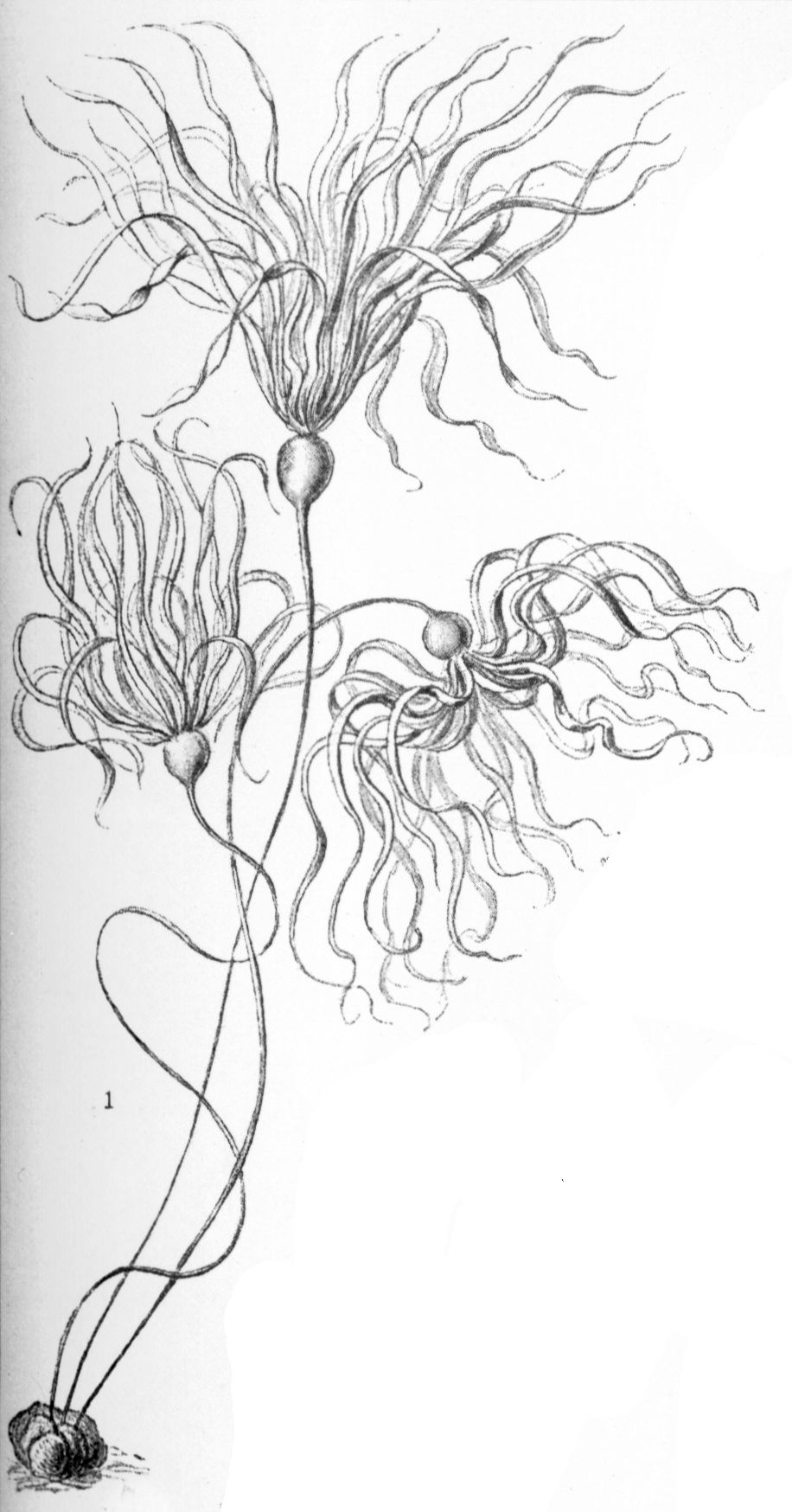 Nereocystis Lütkeana (Mertens) = Nereocystis luetkeana (K.Mertens) Postels & Ruprecht